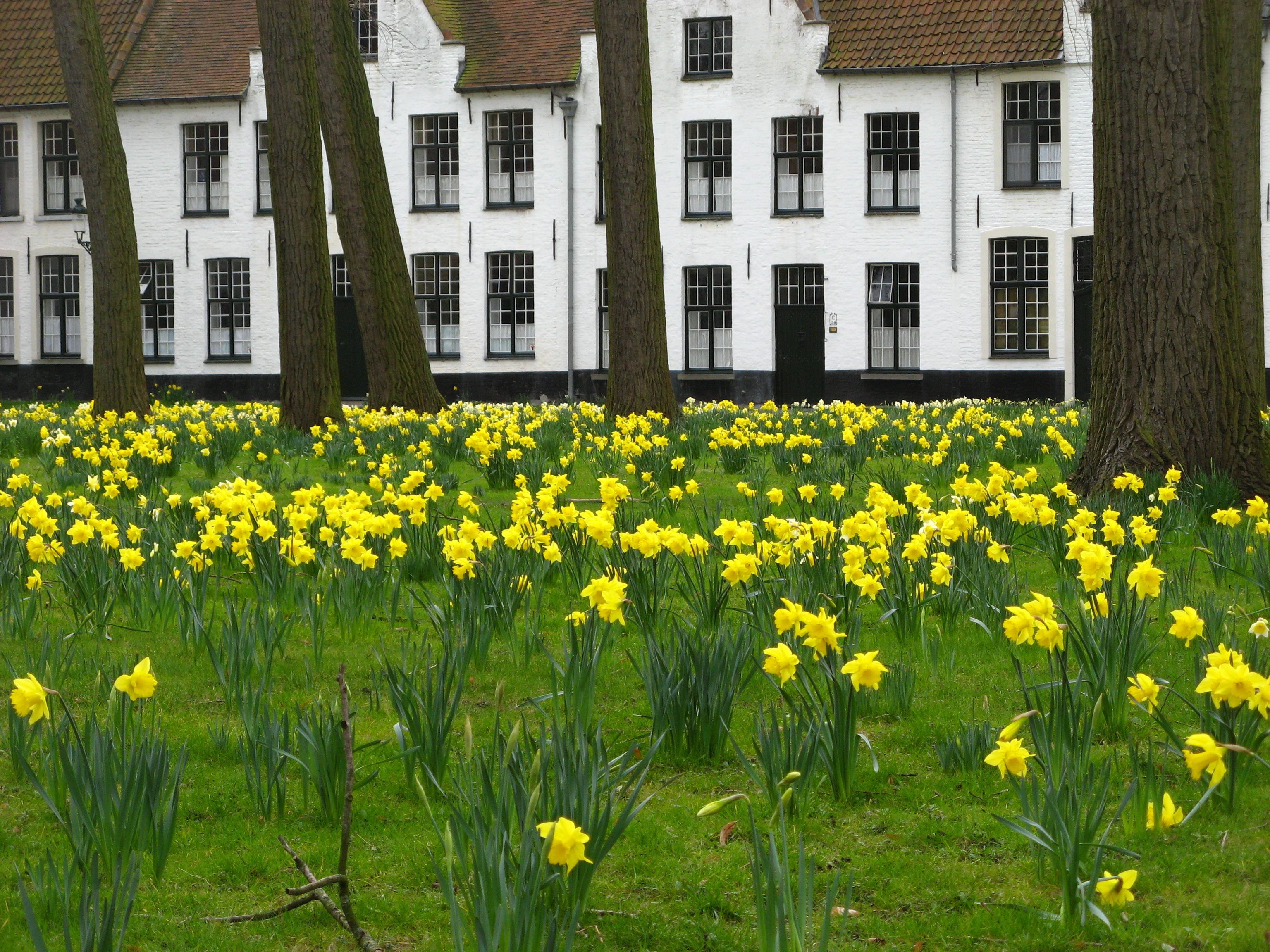 Narcissen, Begijnhof, Brugge